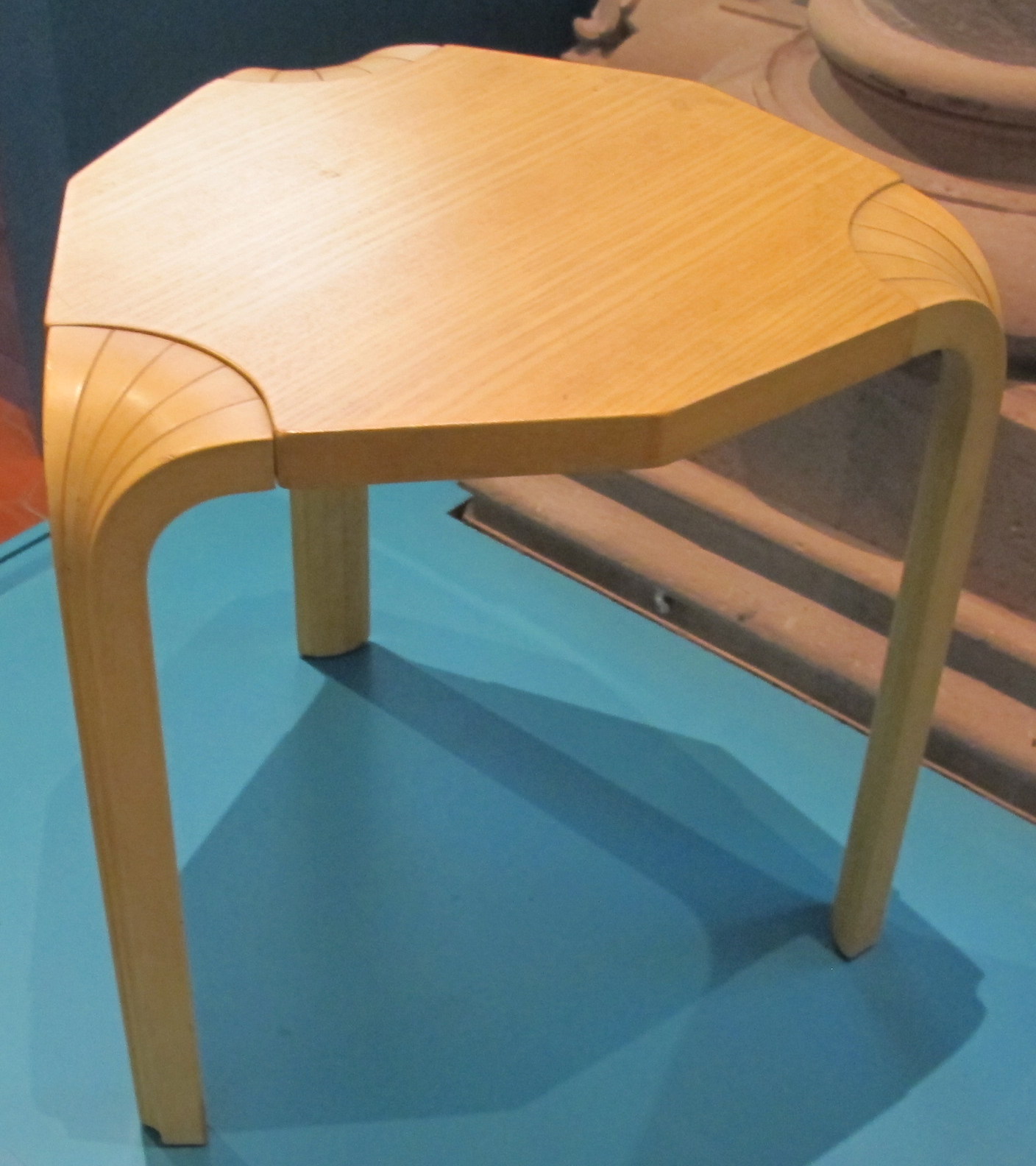 Panchetto x 600, design alvar aalto 1932